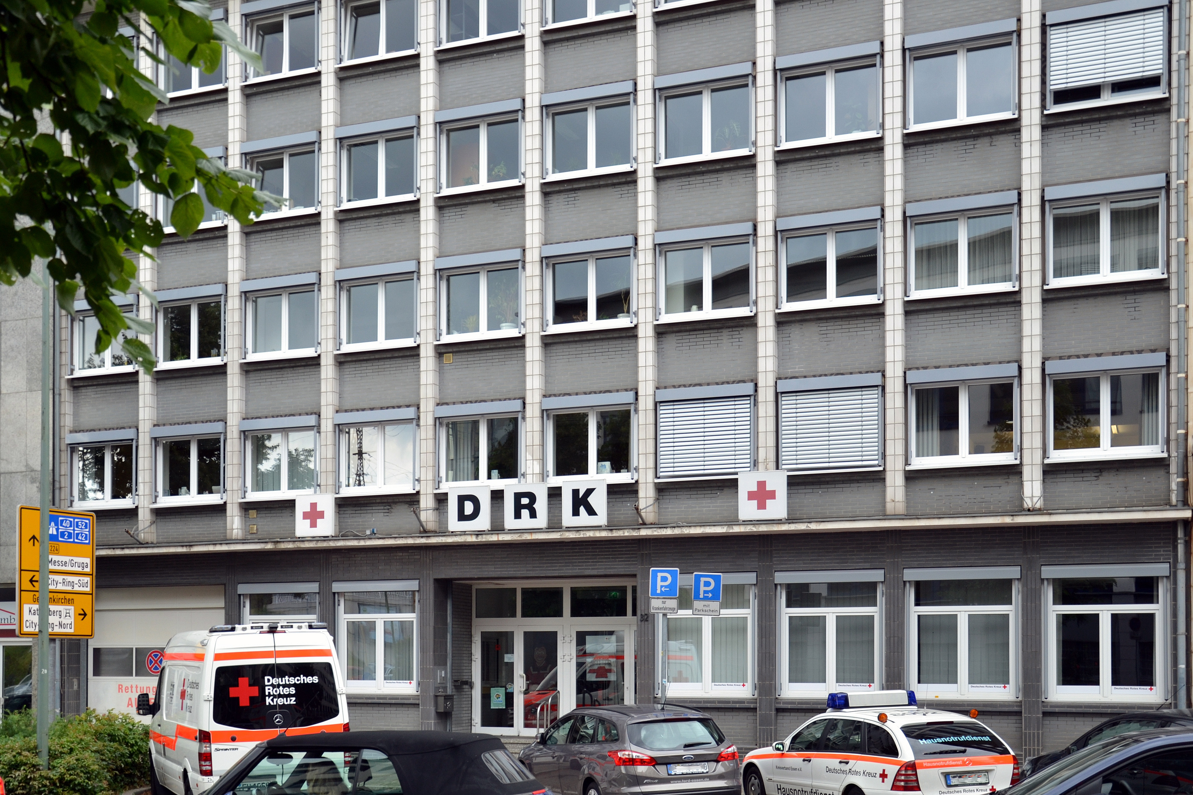 Rotkreuz-Museum in Essen-Stadtkern, Hachestraße